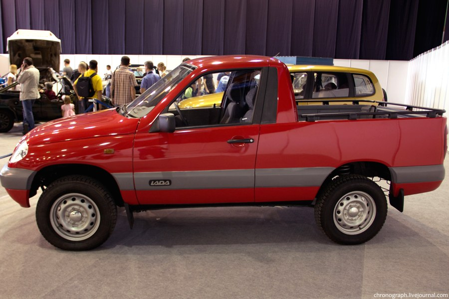 Пикап ВАЗ 2123. Не пошёл в серию из-за продажи лицензии СП GM-Автоваз. Тольяттинский автосалон 2012